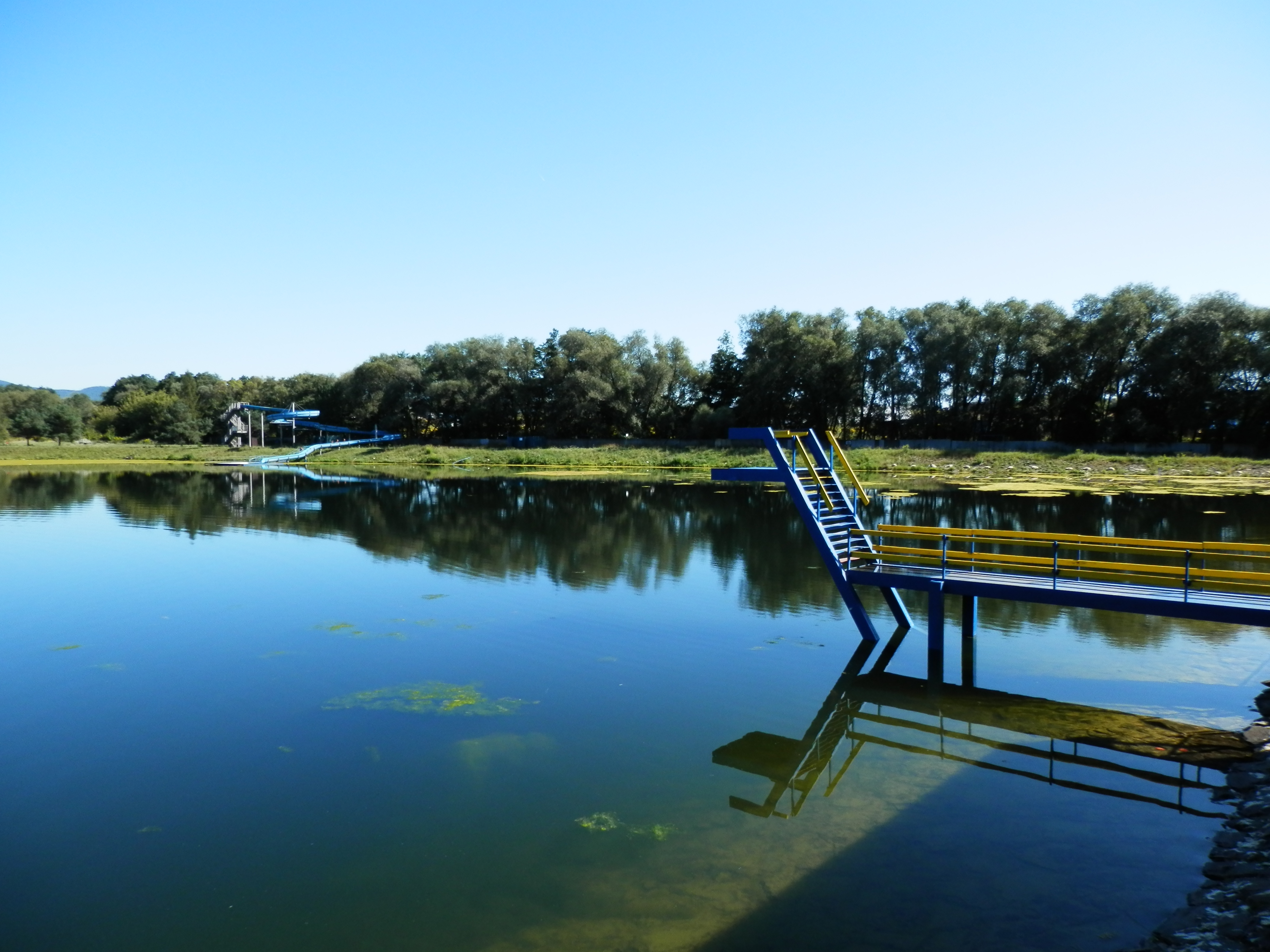 Prírodné kúpalisko Delňa v meste Prešov